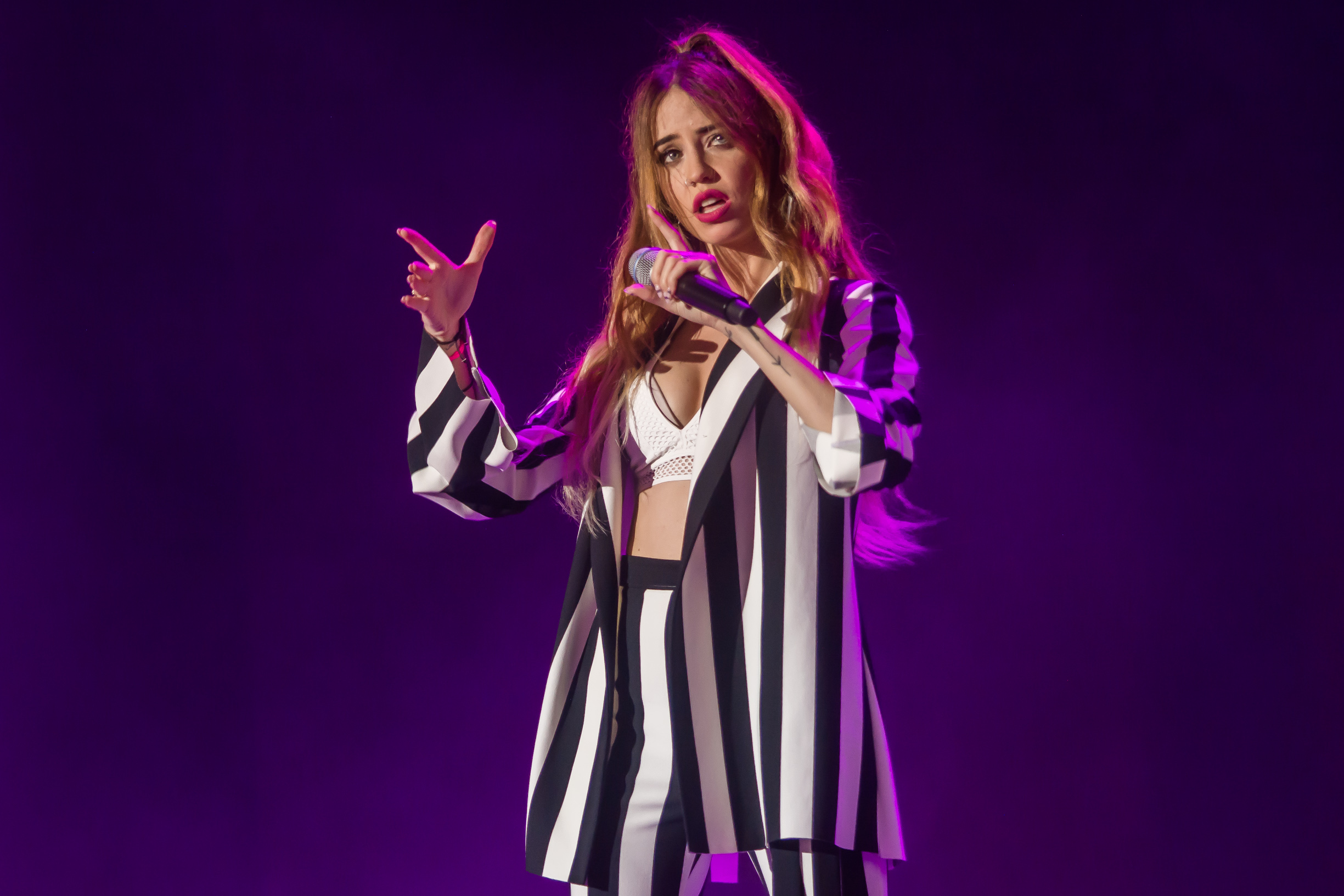 Надежда Дорофеева (группа "Время и стекло") на Europa Plus TV. Hit Non Stop в Витебске 2016